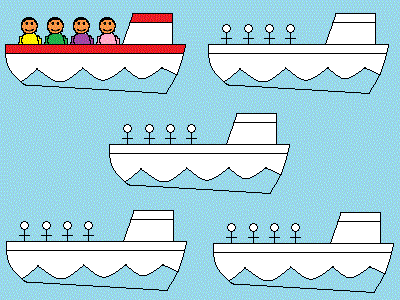 田中博史氏の算数授業のつくり方について